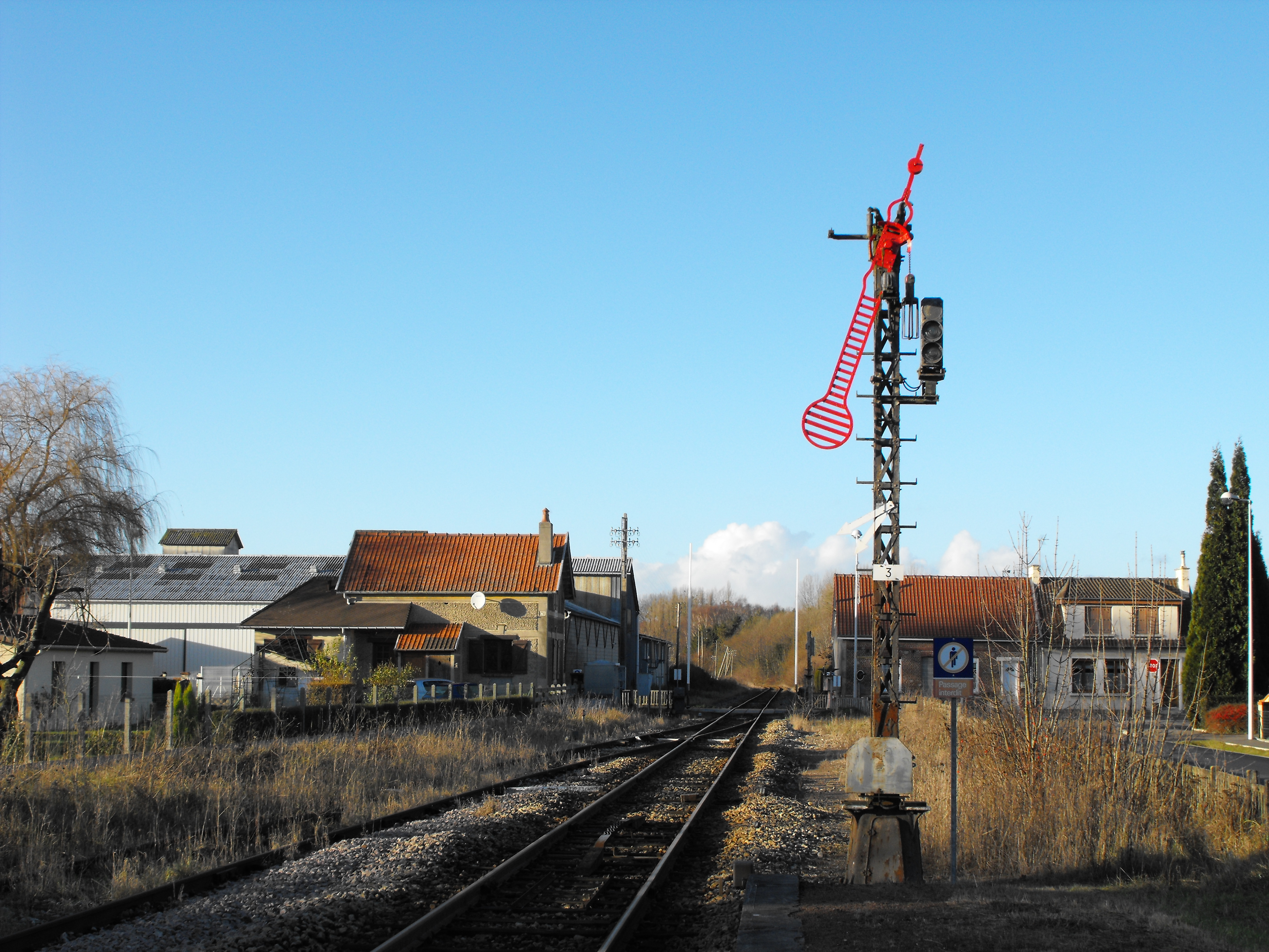 Le sémaphore en gare de Longroy-Gamaches